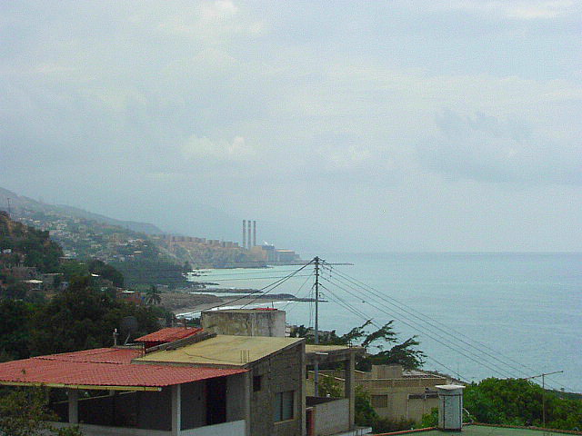 Coast near Mamo, Vargas, Venezuela.